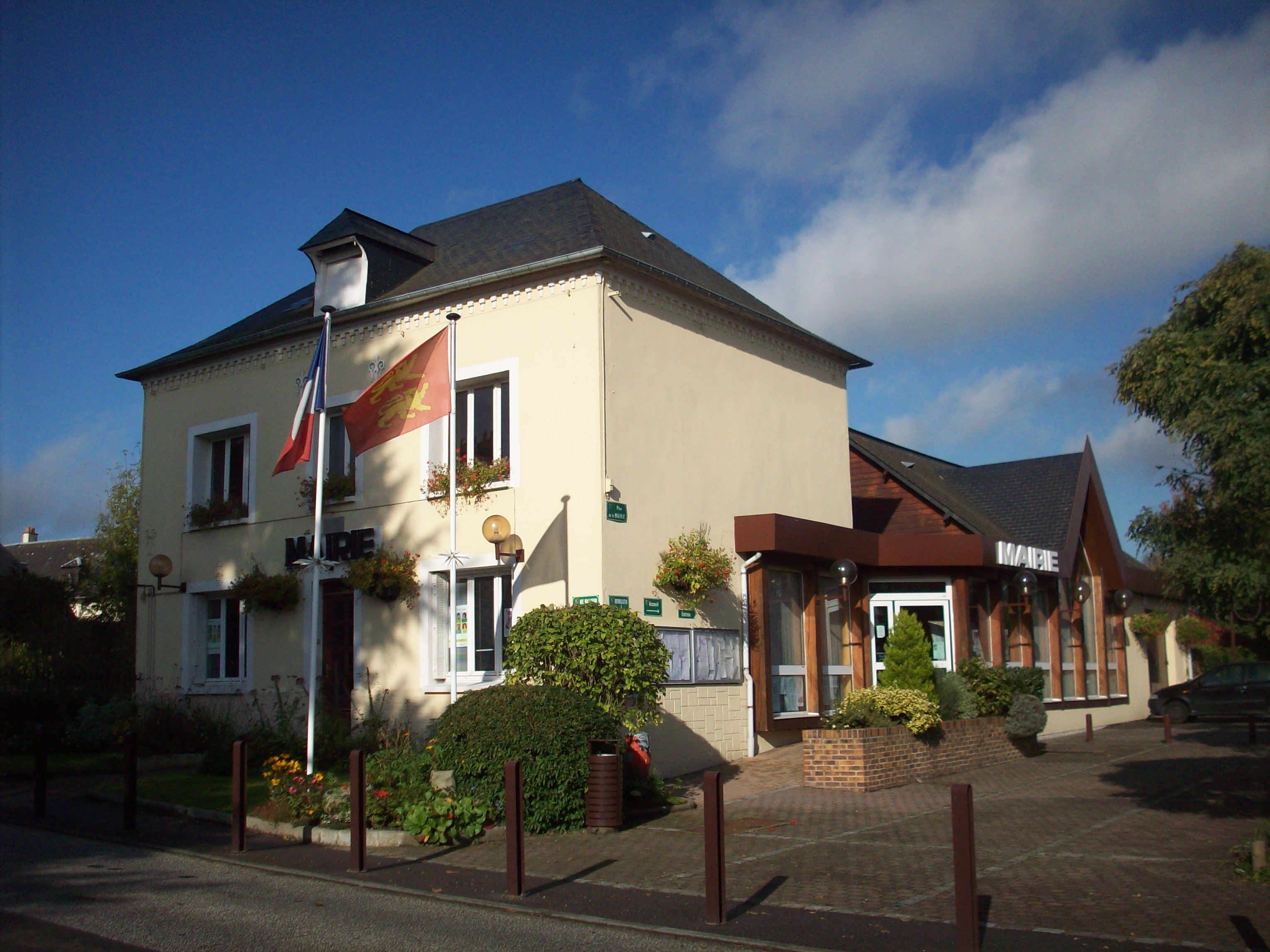 Mairie de Saint-Jean-du-Cardonnay.